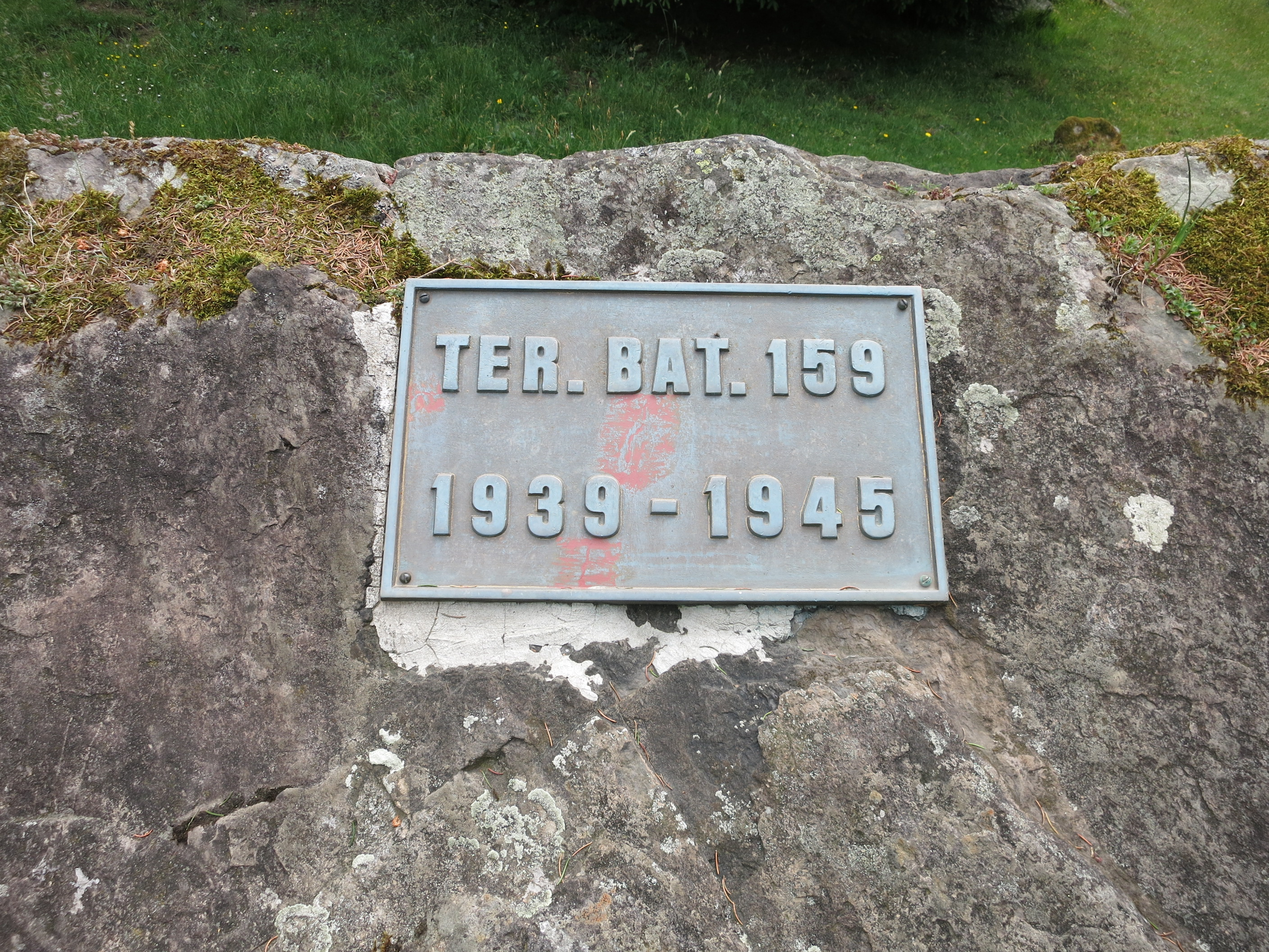 Festung Schollberg SG, Schweiz